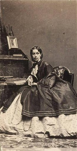 Елизавета Ивановна Черткова, ур. графиня Чернышева-Кругликова (1832—1922)